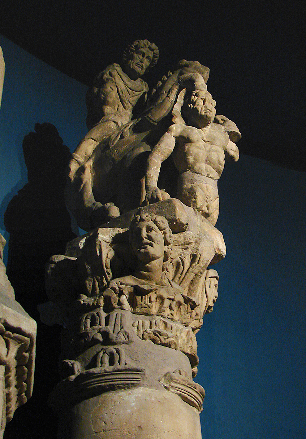 Cavalier à l'anguipède, musées de la Cour d'Or à Metz.